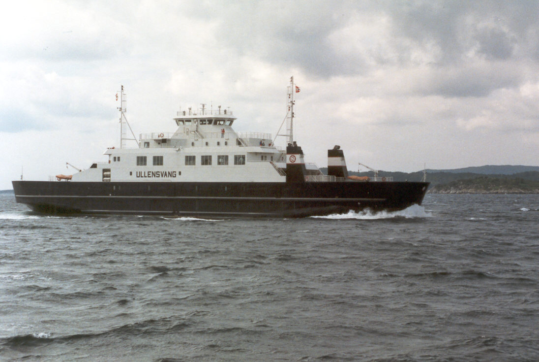 MF Ullensvang, built in 1986.